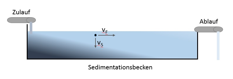 Das Sdimentationsbecken veranschaulicht die Trennung von festen und flüssigen Bestandteilen einer Suspension unter dem Einluss der Gravitationskraft